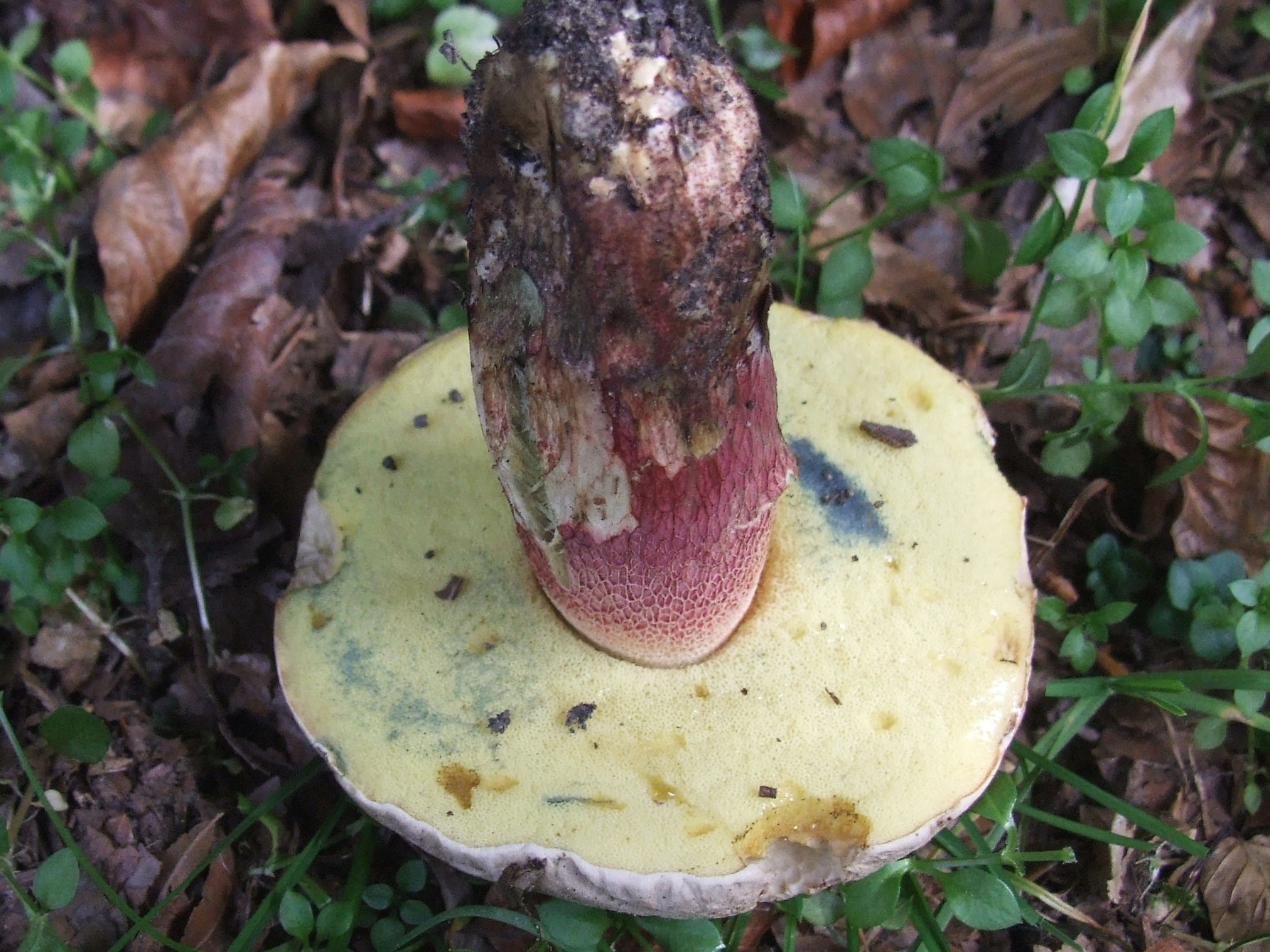 Boletus calopus